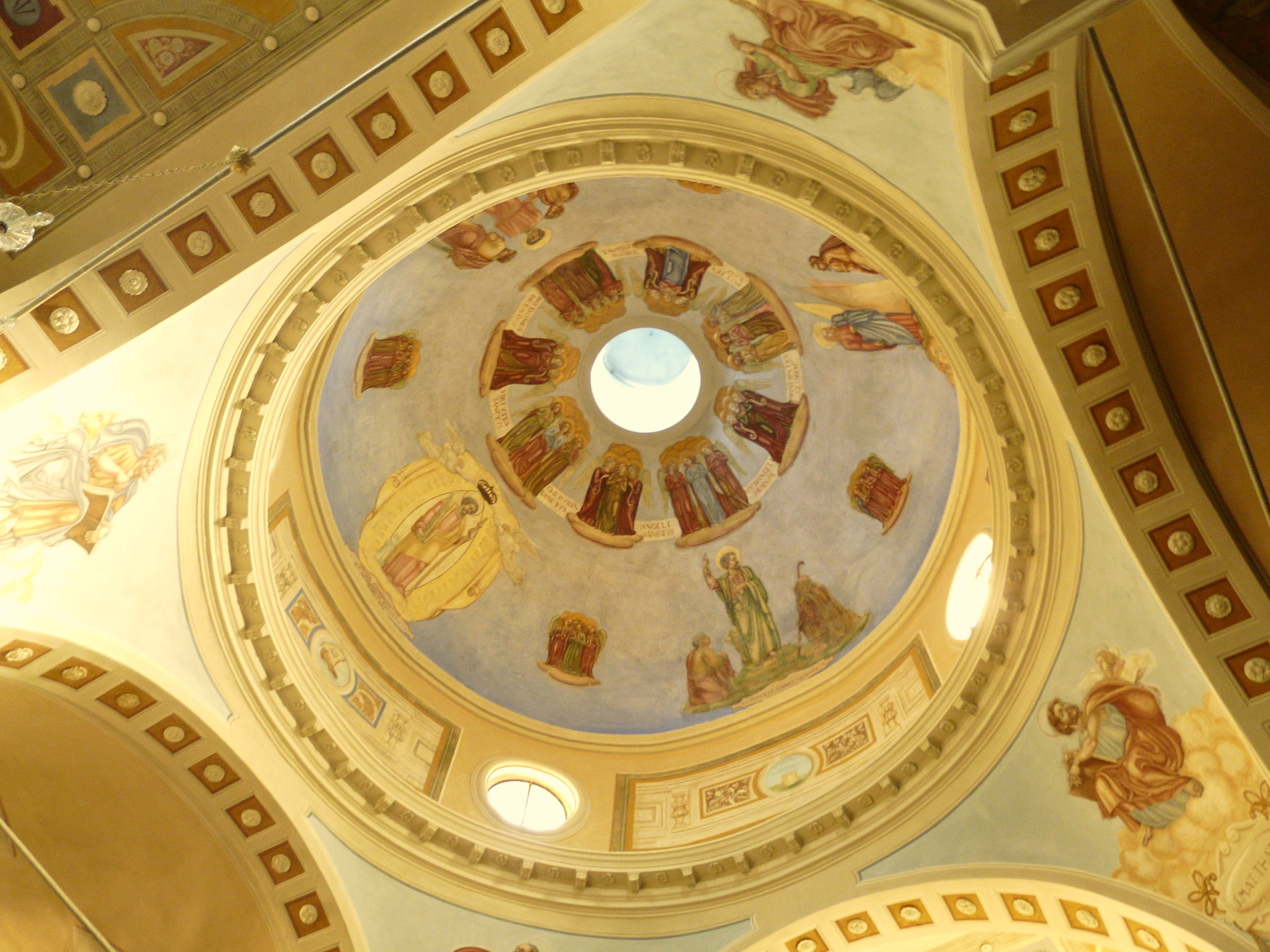 Chiesa dei Santi Giacomo e Cristoforo, Licciana Nardi, Toscana, Italia